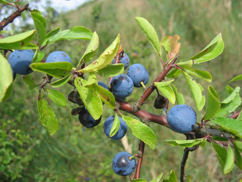 Schlehe (Prunus spinosa), Frucht